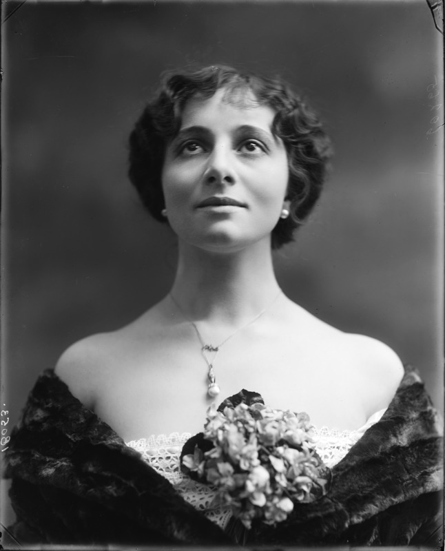 soprano Bianca Stagno Bellincioni